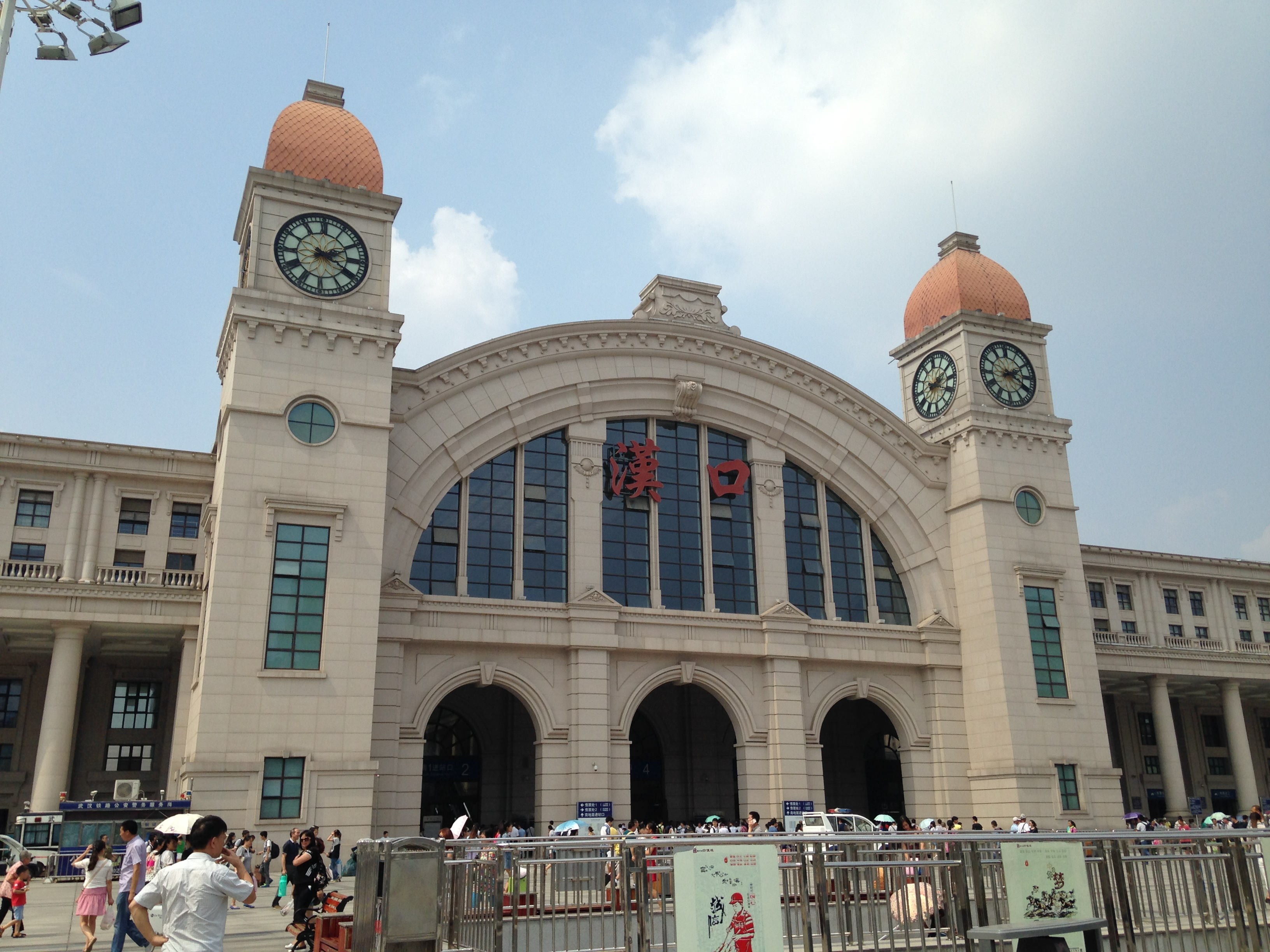 漢口駅の駅舎